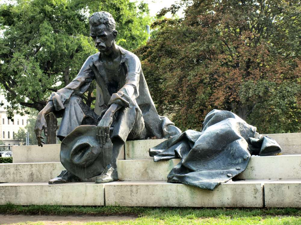 József Attila szobra Budapest, V.ker., a Parlamenttől jobbra lévő parkban